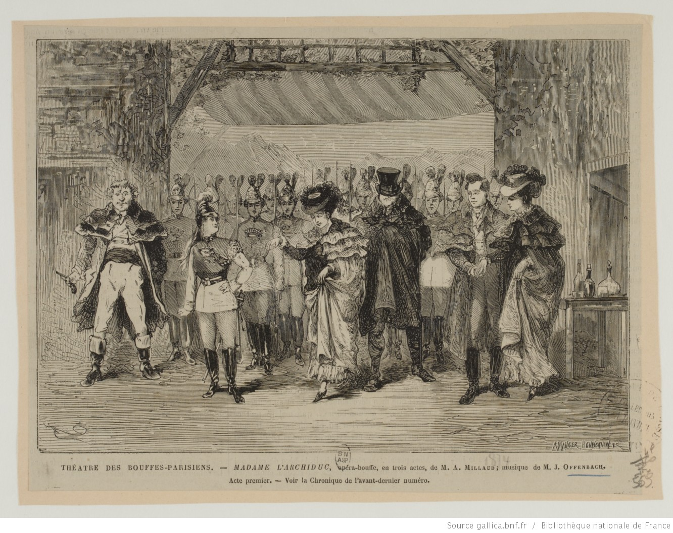 Illustration de presse de l'acte 1 de Madame l'archiduc, l'opéra-bouffe de Jacques Offenbach et Millaud